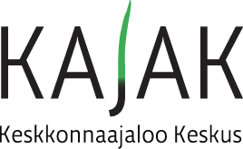 Keskkonnaajaloo Keskuse logo